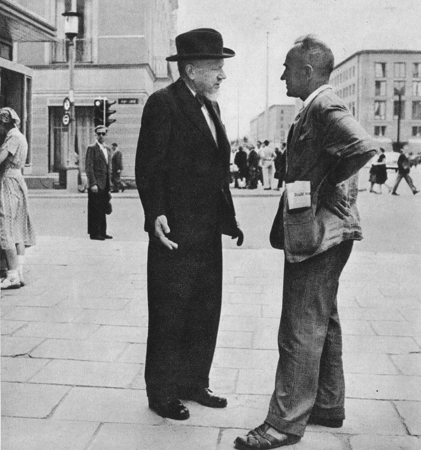 Leopold Staff (z lewej) i Alfons Karny na Nowym Świecie w Warszawie